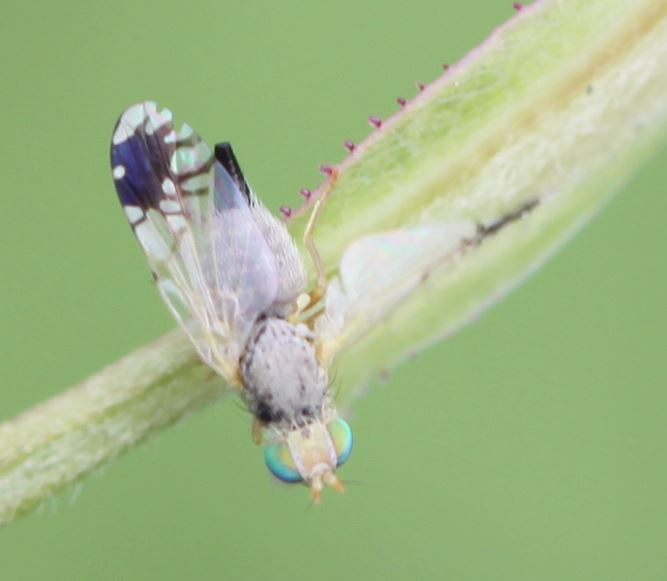 Bohrfliege Trupanea amoena am 19. August 2019 in Walldorf/Baden